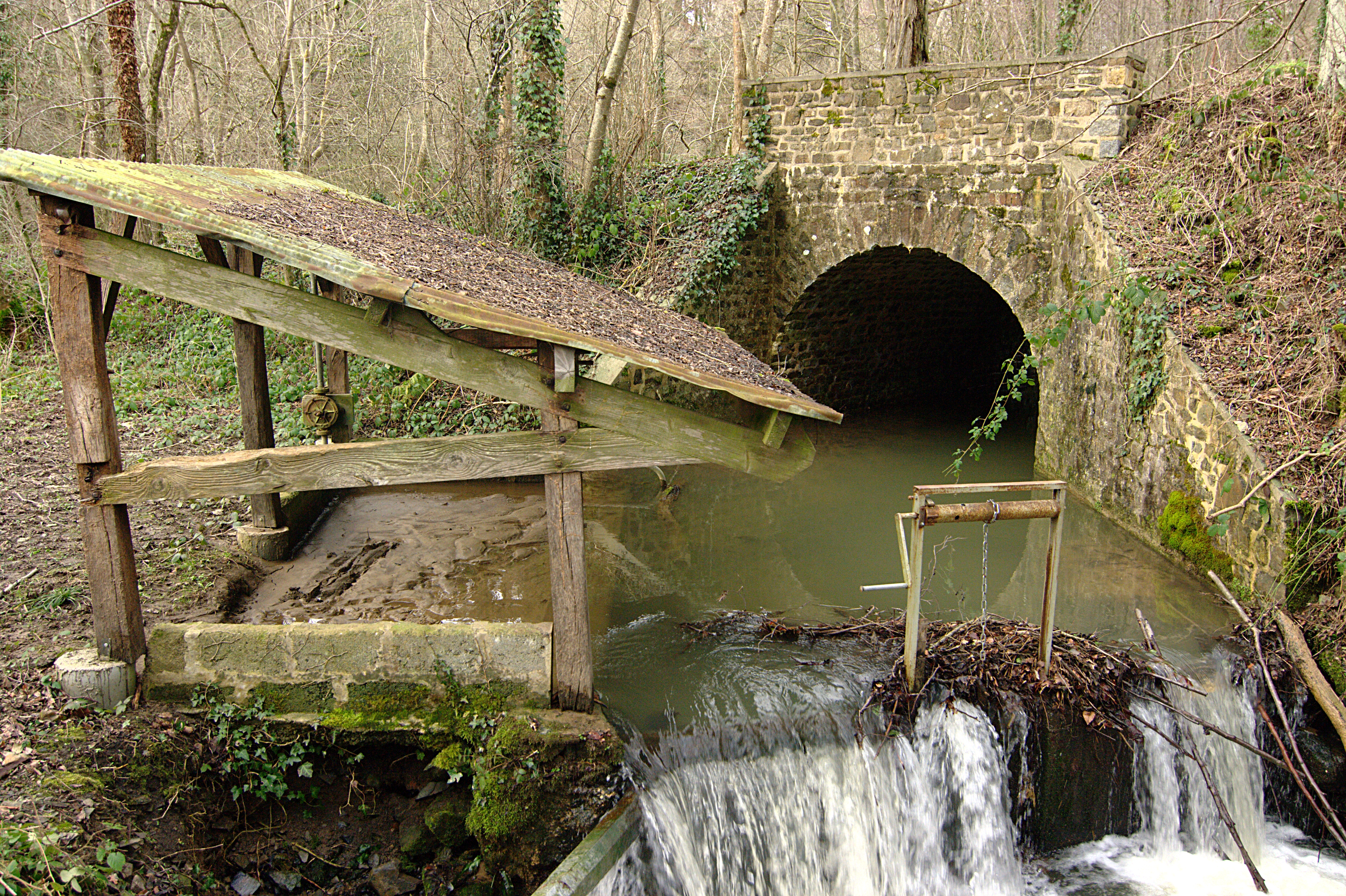 Lavoir sur le ruisseau de la Boulaire, D240 commune de Rapilly, Calvados.